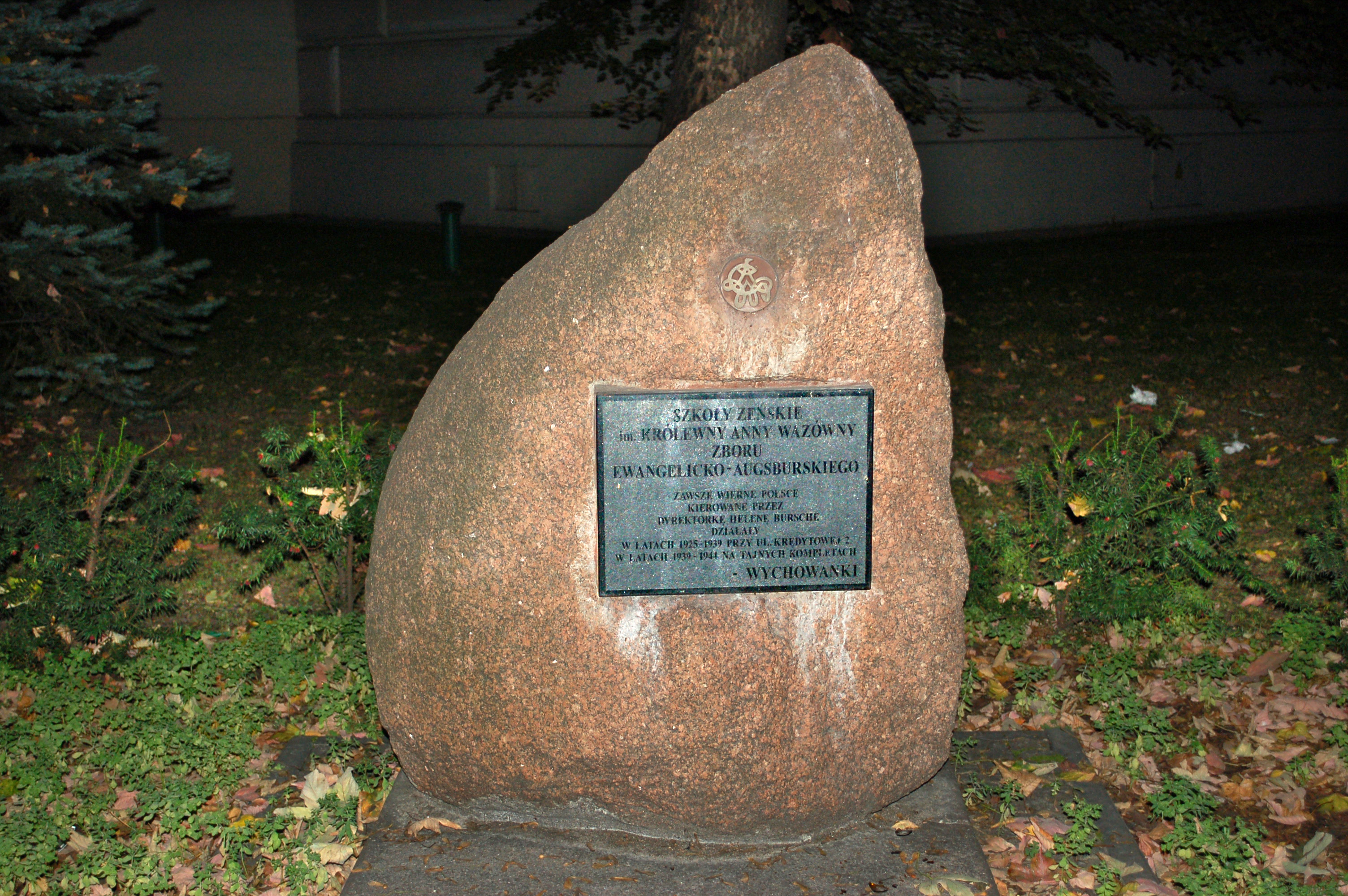 Evangel. Kirche Warschau